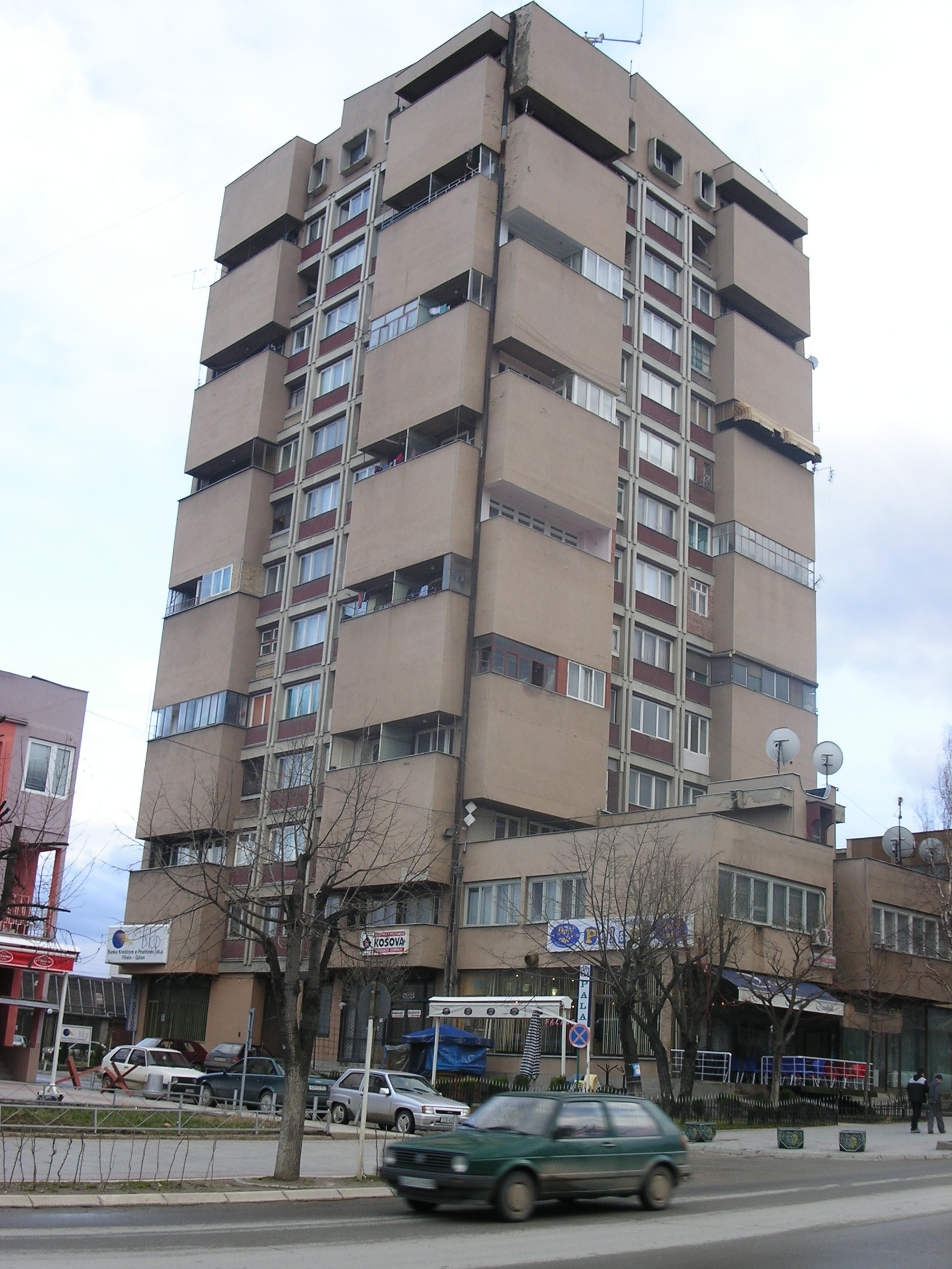 Gnjilane/Gnjilani